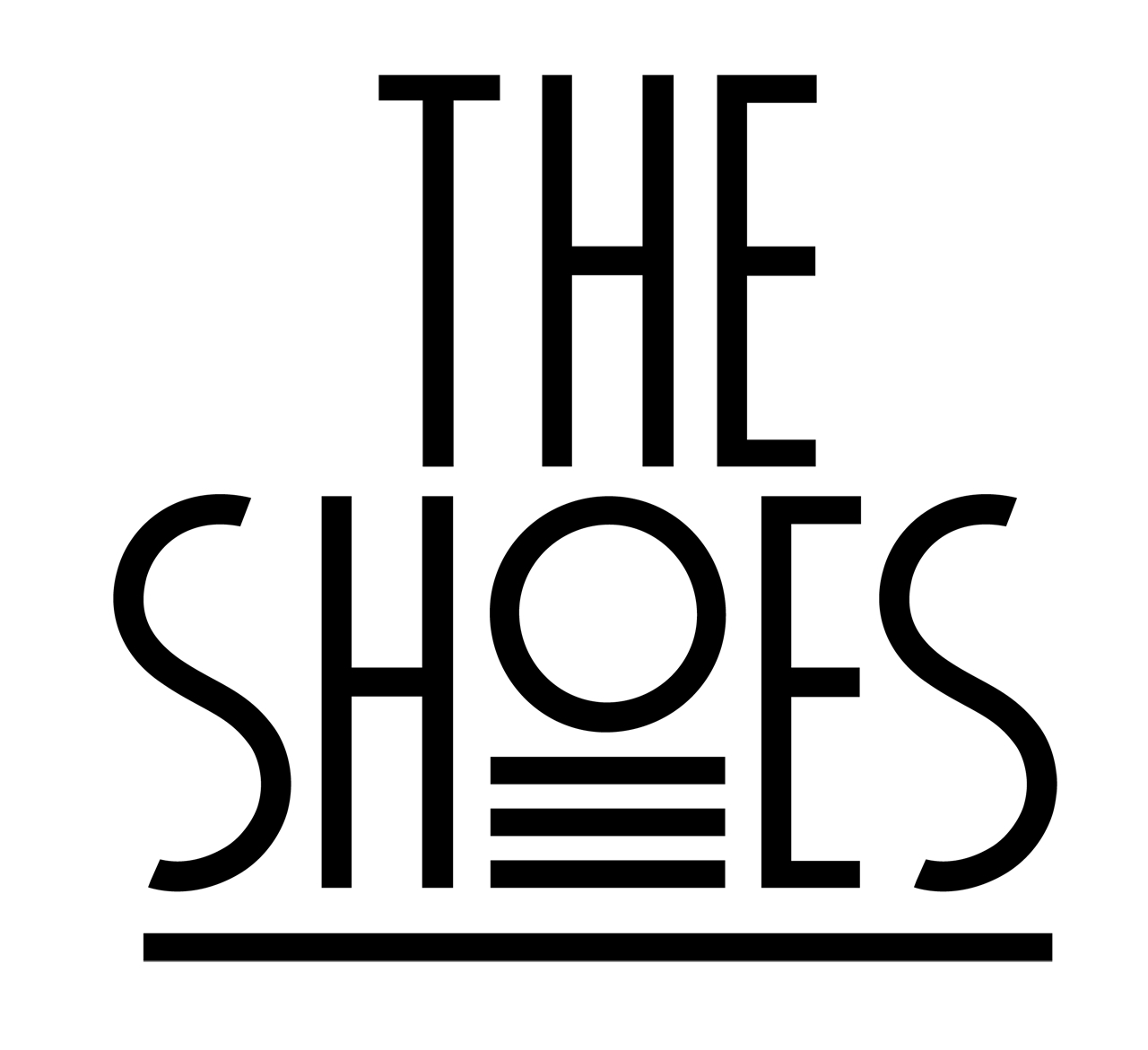 logo du groupe The Shoes